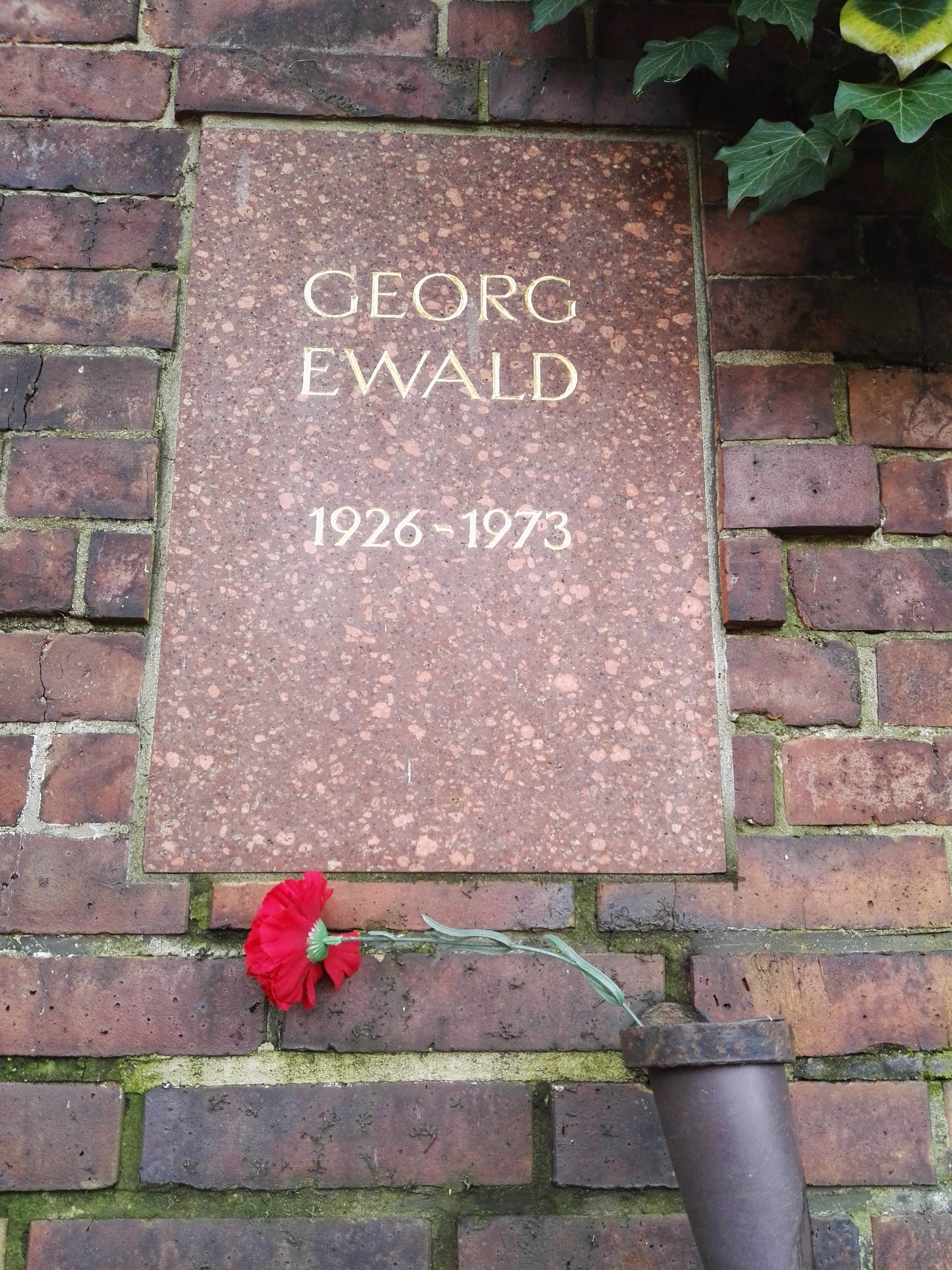 Grab von Georg Ewald in der Gedenkstätte der Sozialisten auf dem Zentralfriedhof Friedrichsfelde in Berlin-Lichtenberg